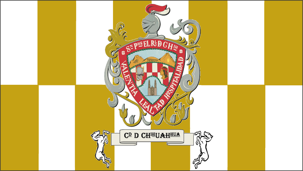 Bandera del Municipio de Chihuahua, aprobada en sesion de cambildo en Diciembre de 2006